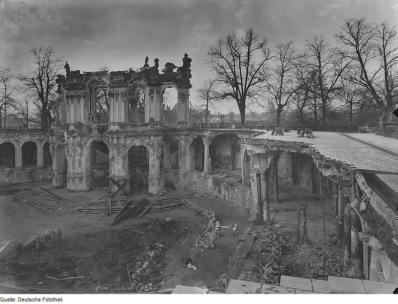 Original image description from the Deutsche Fotothek Zwinger. Ruine des Wallpavillons und der nördlichen Bogengalerie